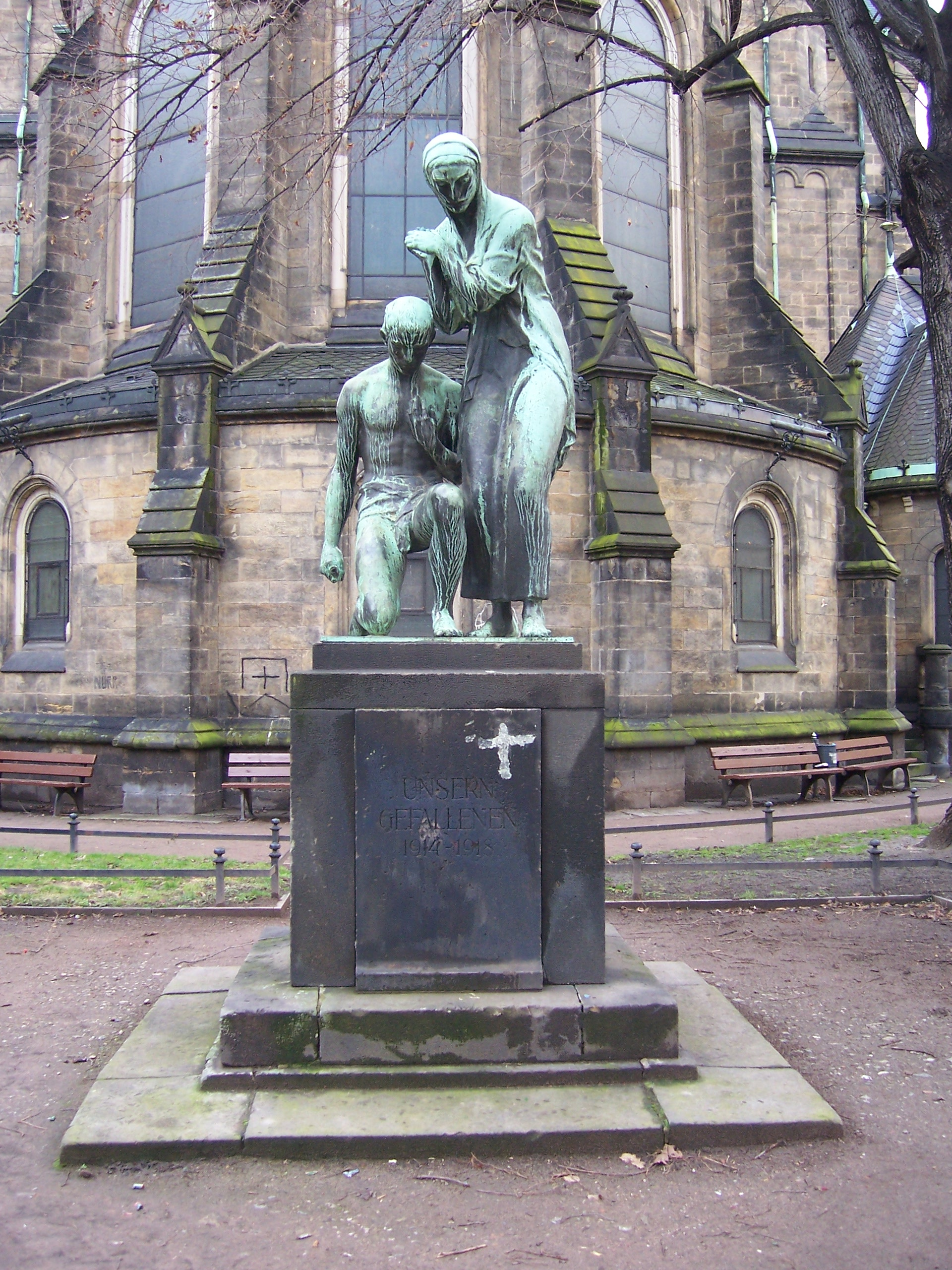 Kriegerehrenmal, Erster Weltkrieg, von August Schreitmüller (1923) auf dem Martin-Luther-Platz in Dresden